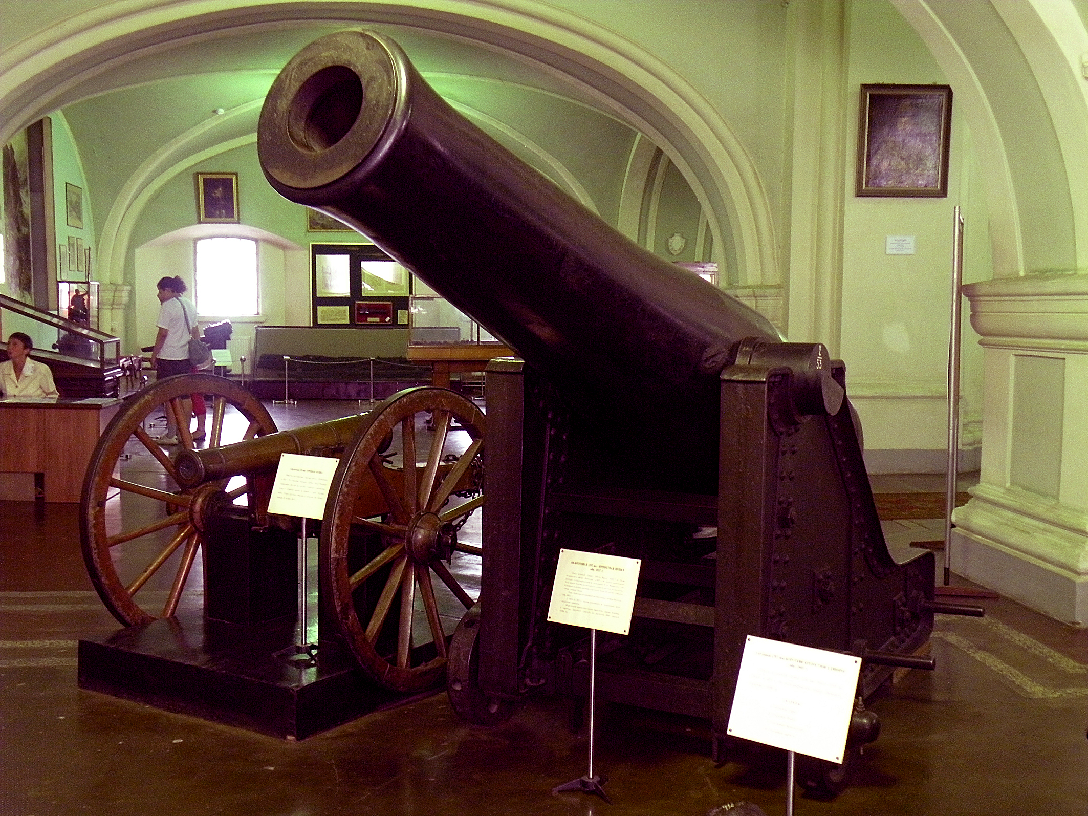 60-фунтовая (197 мм) крепостная пушка системы Маиевского. Экспонат артиллерийского музея. СПб.